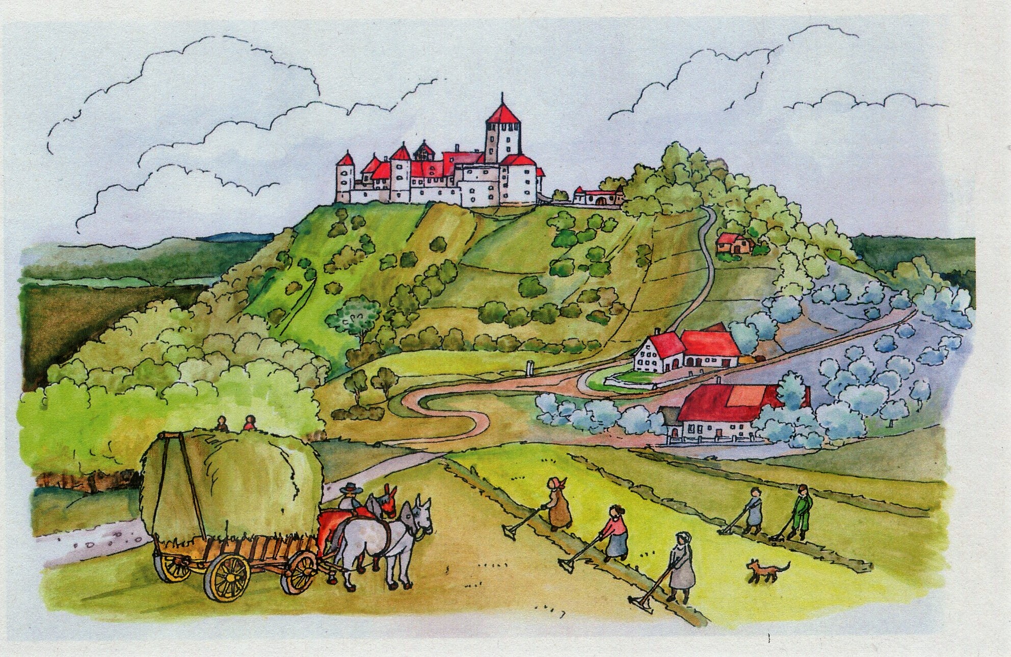 Küssaburg im Landkreis Waldshut in Baden-Württemberg. Zeichnung von Wolf Pabst. Titel des Bildes: „Heuernte auf der Hochebene östlich der Burg (um 1615)“.